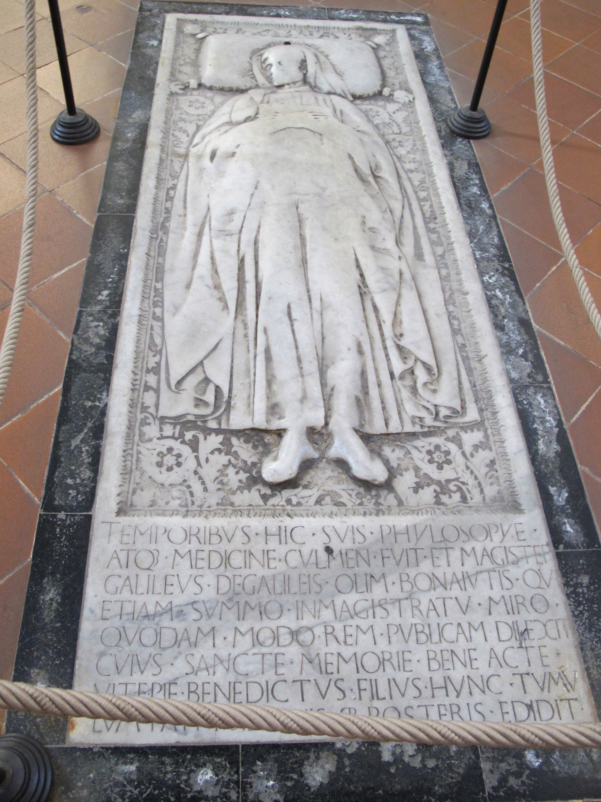 S. croce, tomba sul pavimento 60 maestro di galileo